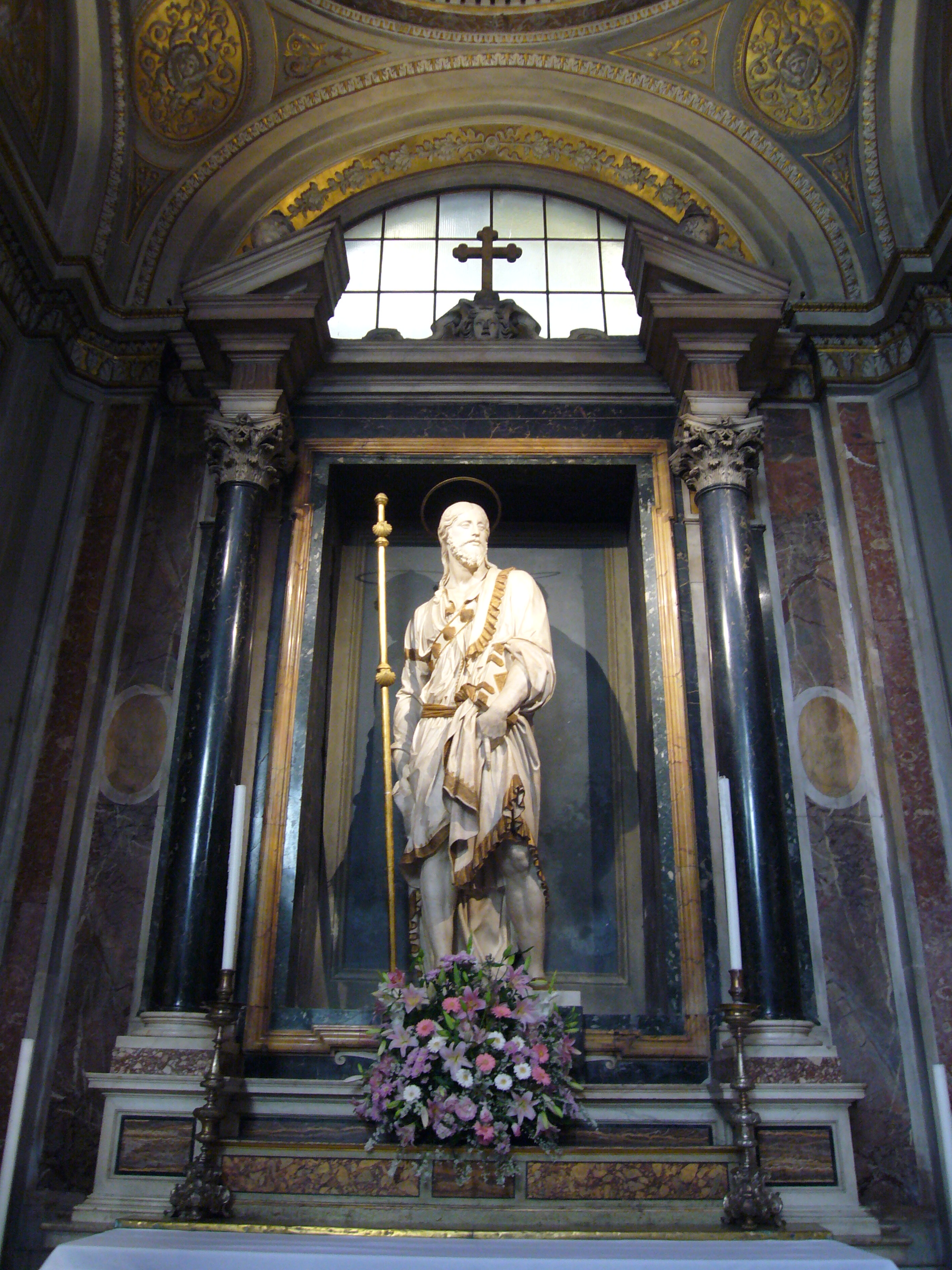 Roma, Santa Maria in Monserrato: San Giacomo maggiore di Jacopo Sansovino nella terza cappella di sinistra (1517)